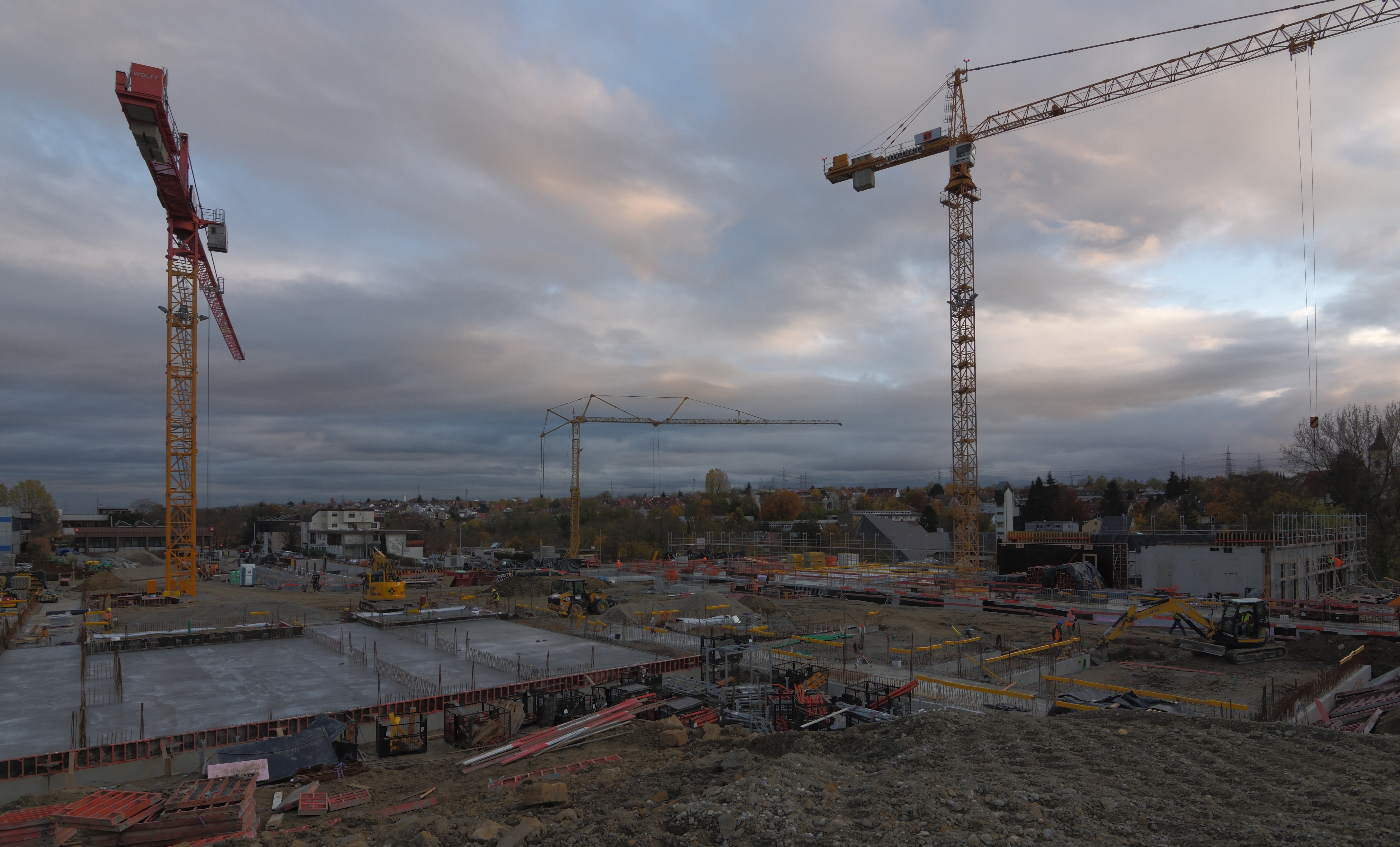 Freiberg am Neckar, Neubau der Oscar-Paret-Schule, November 2019